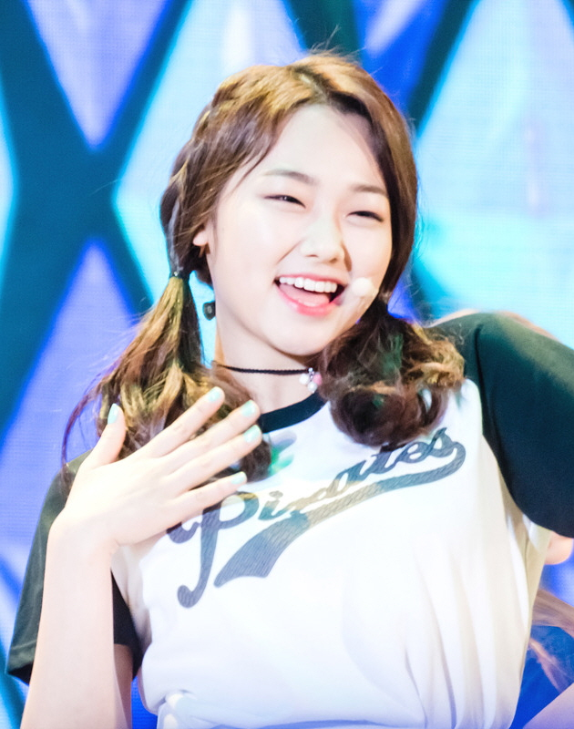 청페 세정 도연 채연 나영 미나